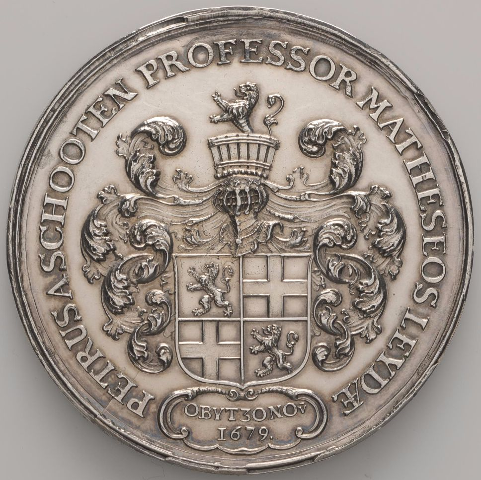 Begrafenispenning van Petrus van Schooten (1634-1679) - muntzijde